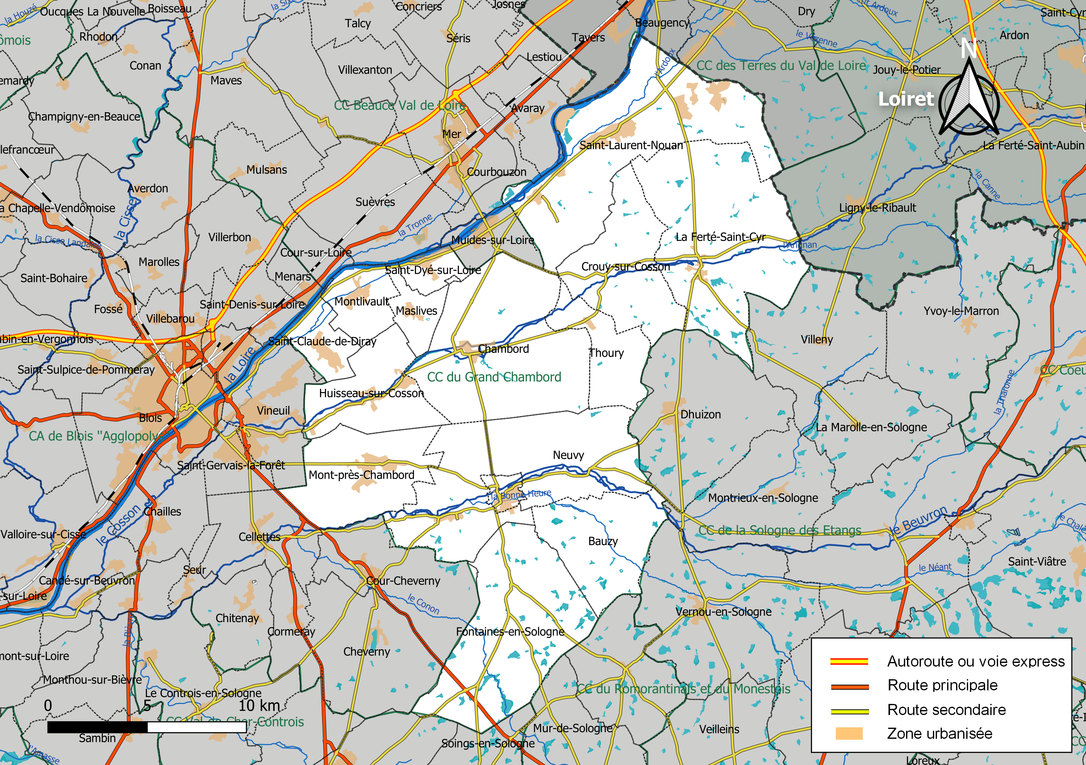 Carte de la communauté de communes du Grand Chambord, département de Loir-et-Cher, France. Composition au 1er janvier 2019.